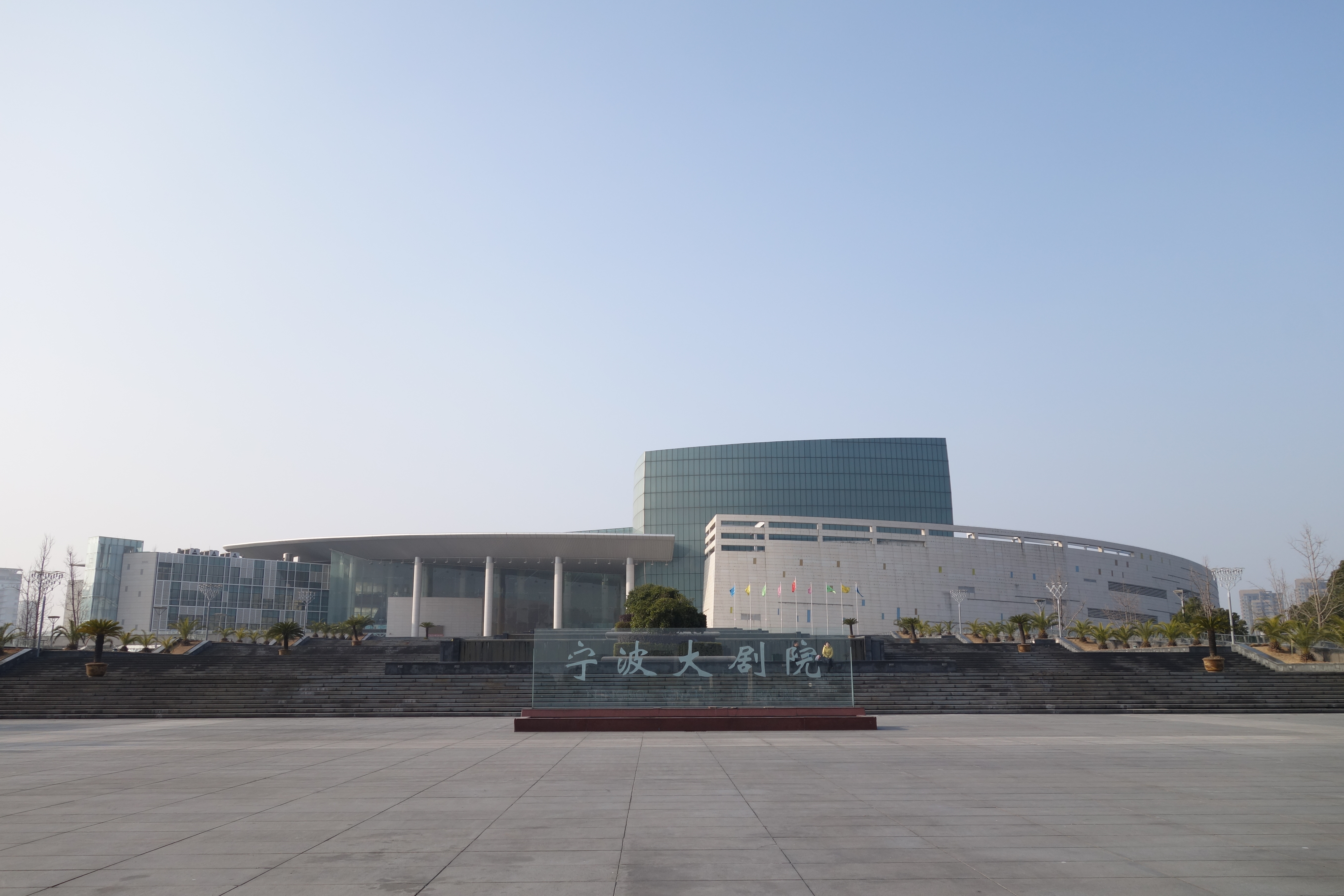 宁波大剧院正面